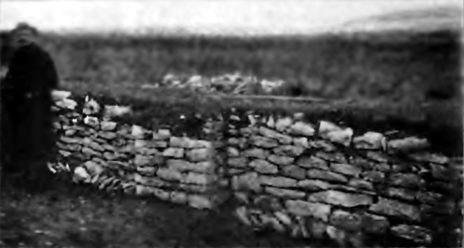 Raetischer Limes: Die Limesmauer nahe der Straße Weißenburg-Burgsalach mit einem Mauervorsprung der in diesem Bereich öfters beobachtet wurde.